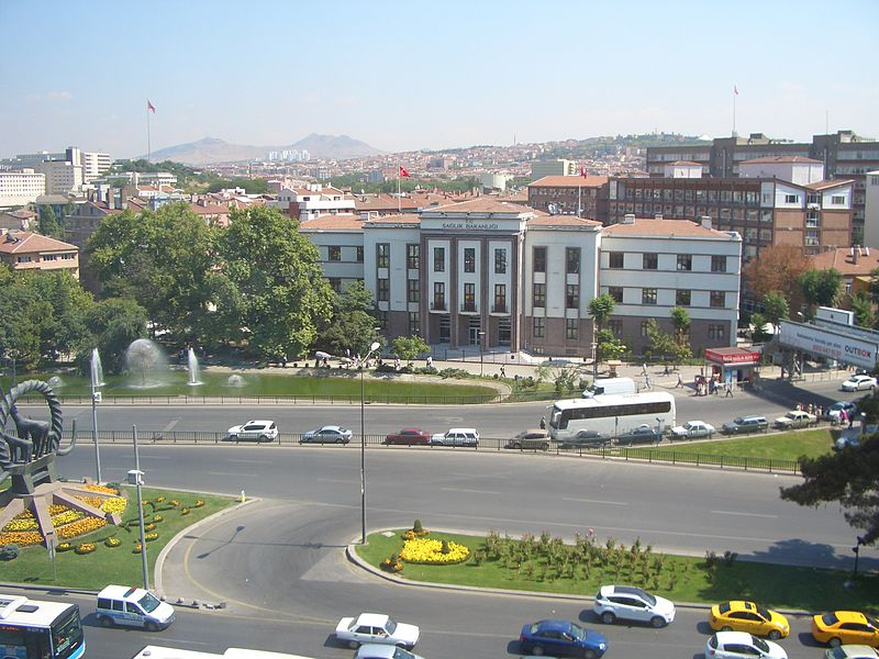 T.C. Sağlık Bakanlığı binası görüntüsü, Ankara - Türkiye.